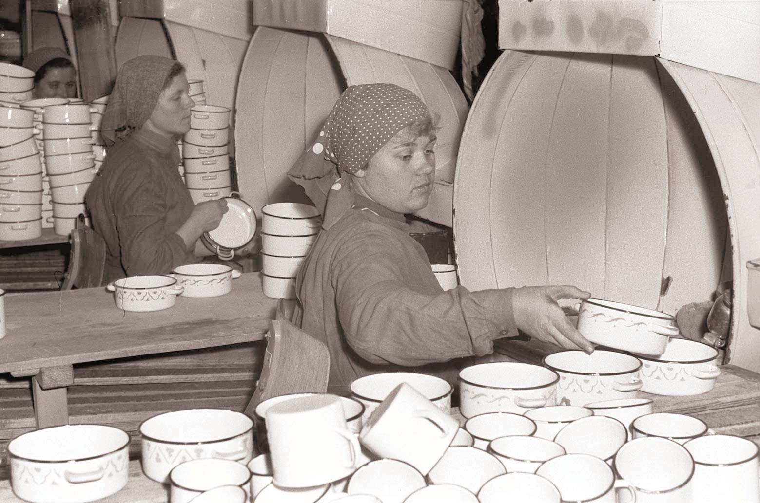 Tovarna emajlirane posode Celje - proizvodnja.